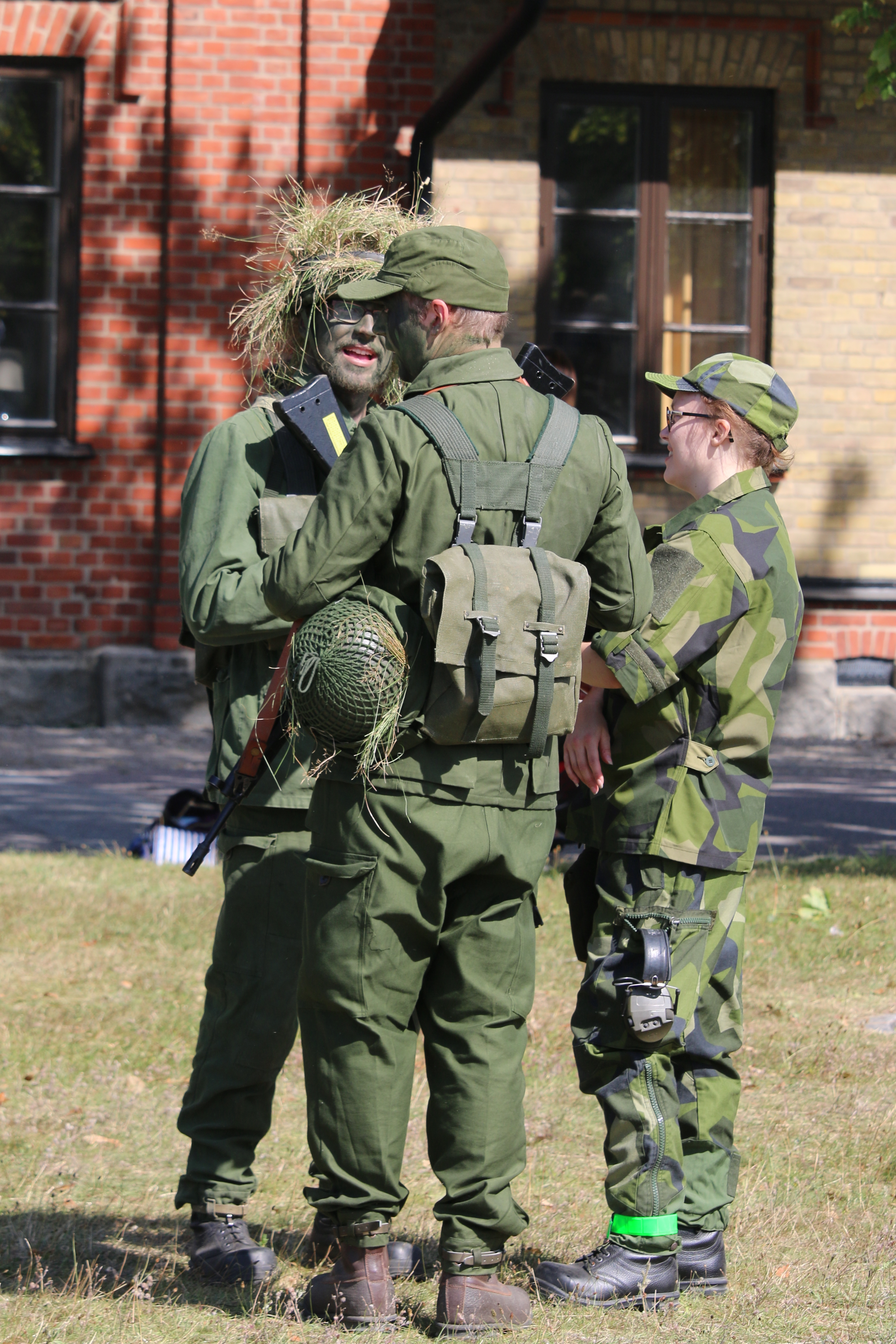 Soldater m/59 Revinge 2015